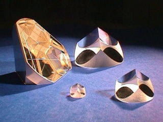 кутовий відбивач